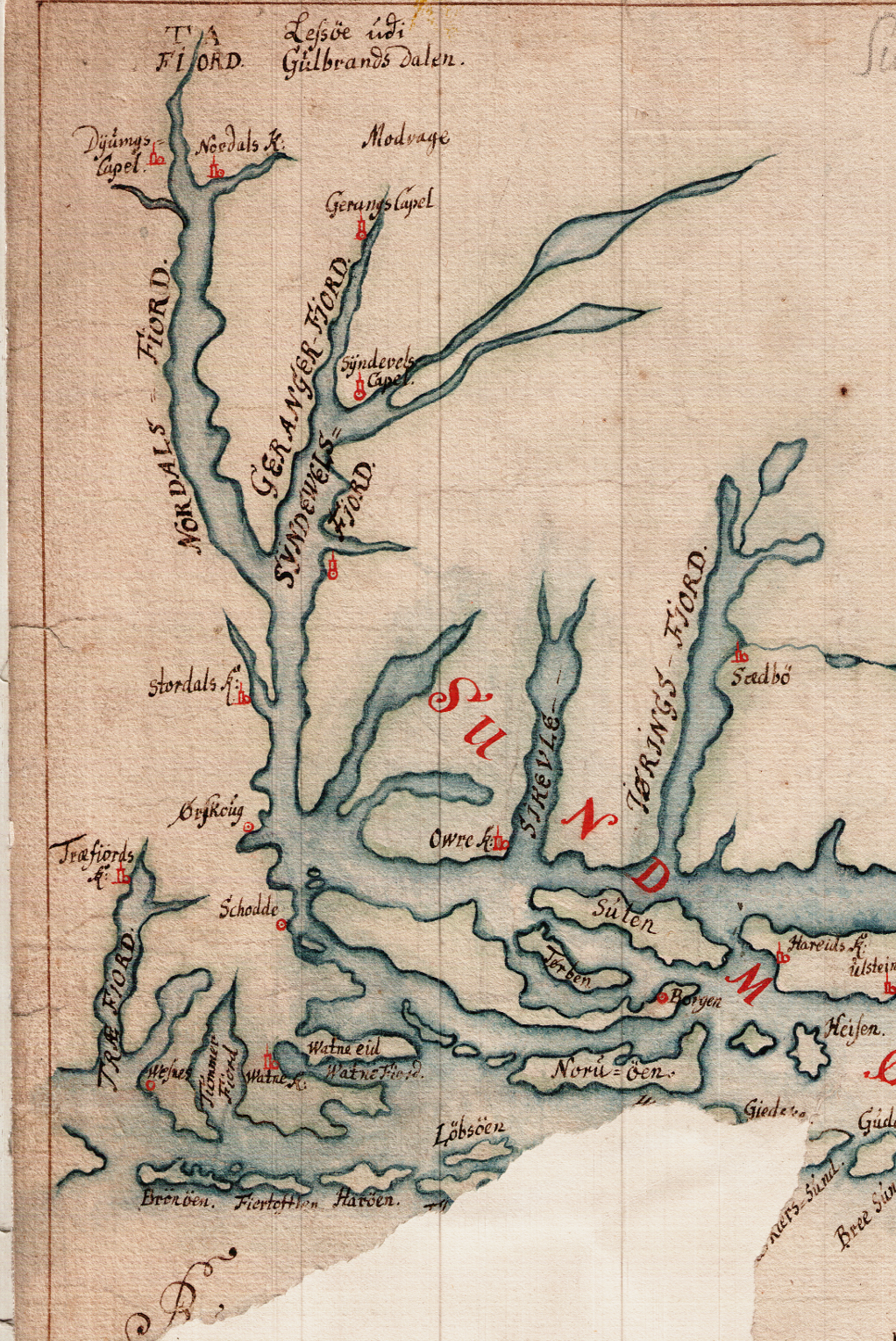 Sjøkart fra 1610 over kysten fra Karmøy til Geirangerfjorden. Håndtegnet i ukjent målestokk. Original kartstørrelse ca 74 cm x 31 cm. Et eksemplar befinner seg hos Statens kartverk Sjø i Stavanger.